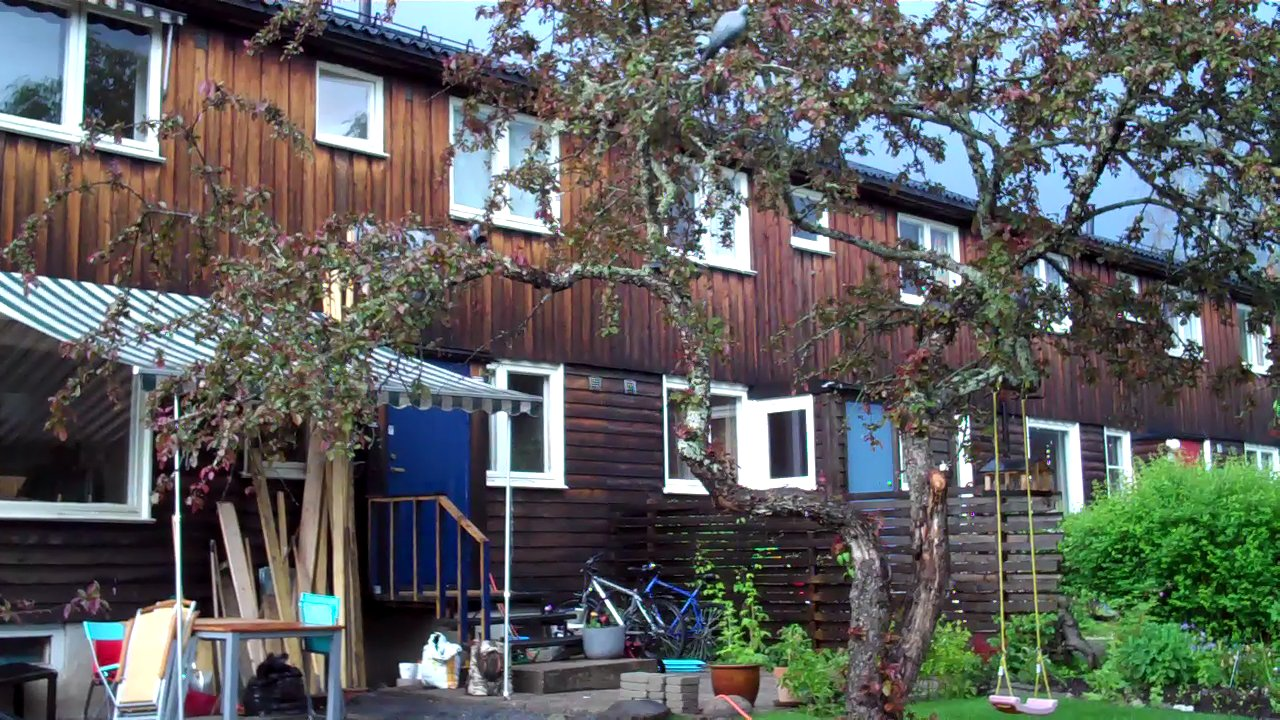 Trolltun Borettslag på Bøler i Oslo.